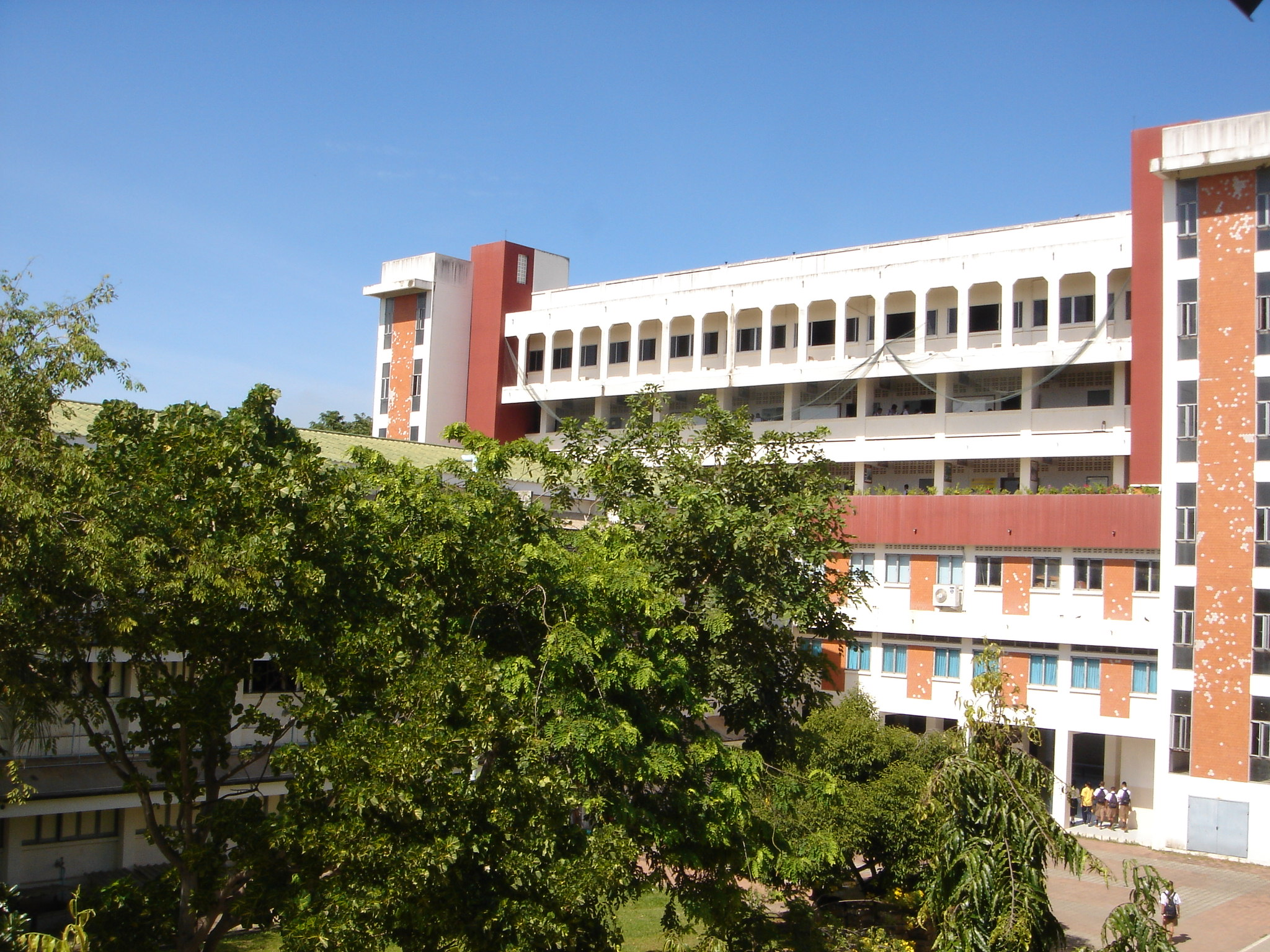 อาคาร6 โรงเรียนกรรณสูตศึกษาลัย